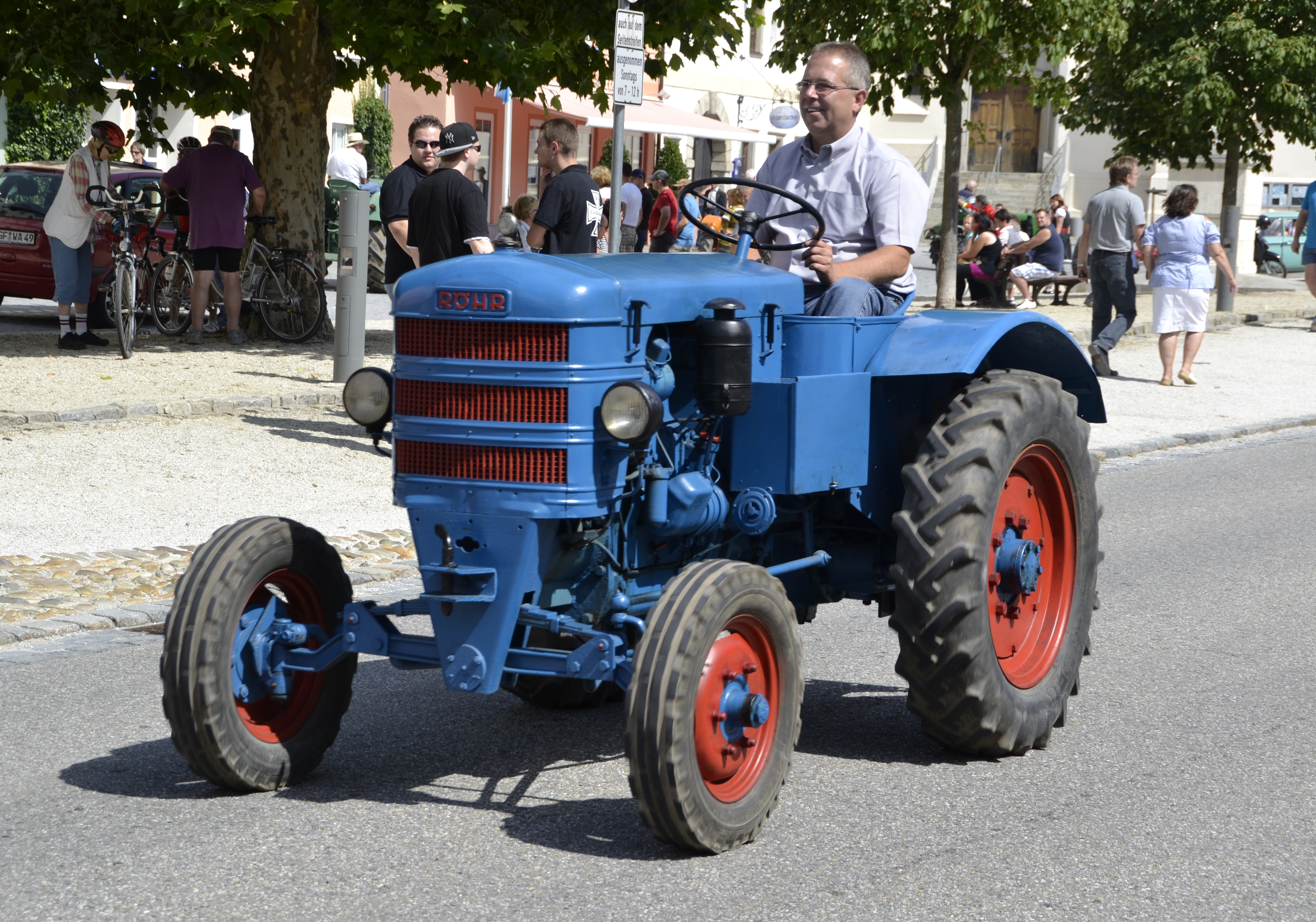 Der Oldtimerumzug in Aidenbach (Bayern) im August 2012.